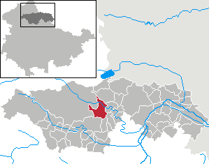 Hachelbich in Thuringia - Kyffhäuserkreis